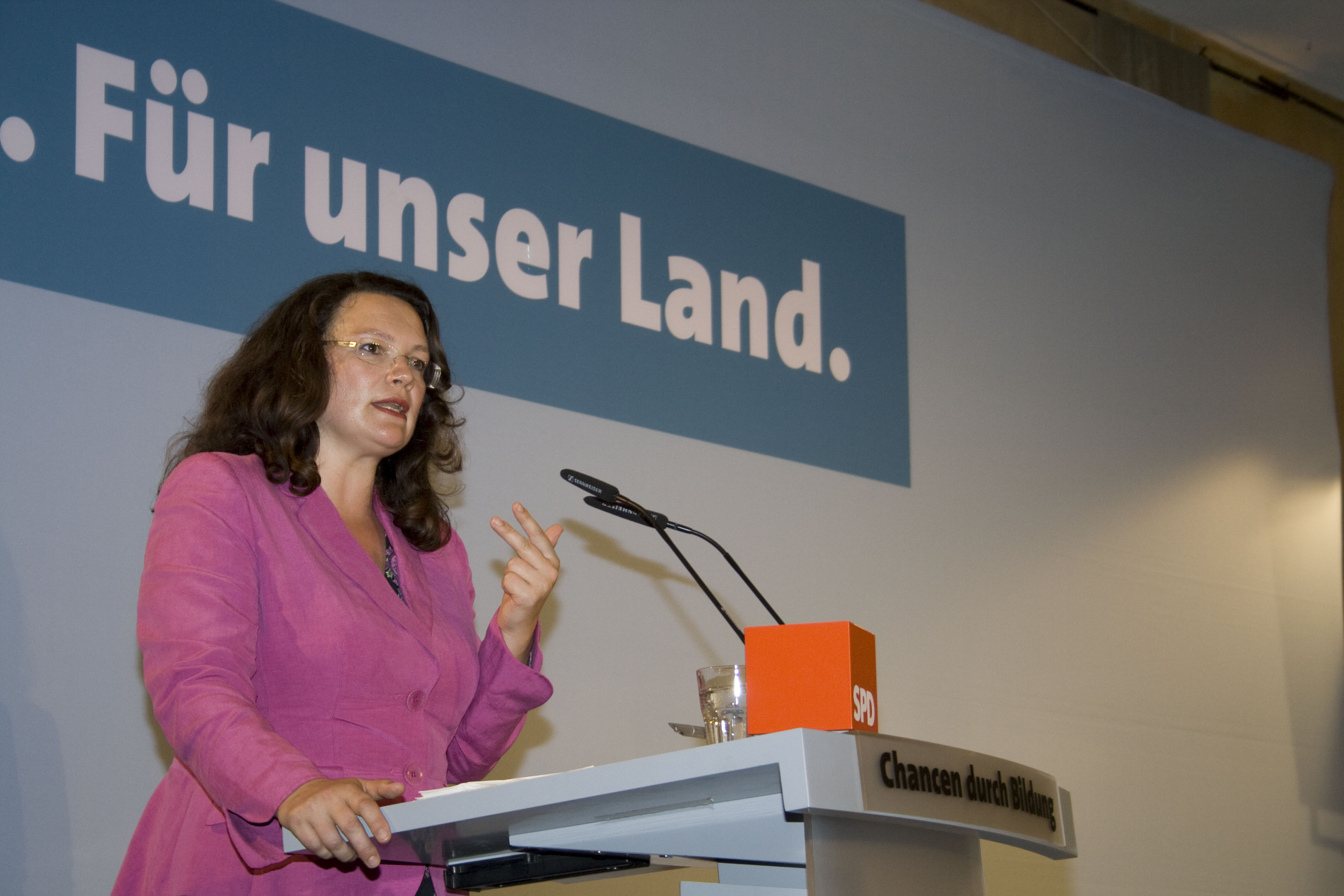 Andrea Nahles bei der Veranstaltung „Gemeinsam für einen neuen Bildungsaufbruch - Gleiche Chancen durch Bildung und Integration“ am 20.08.2009 im Legienhof in Kiel.